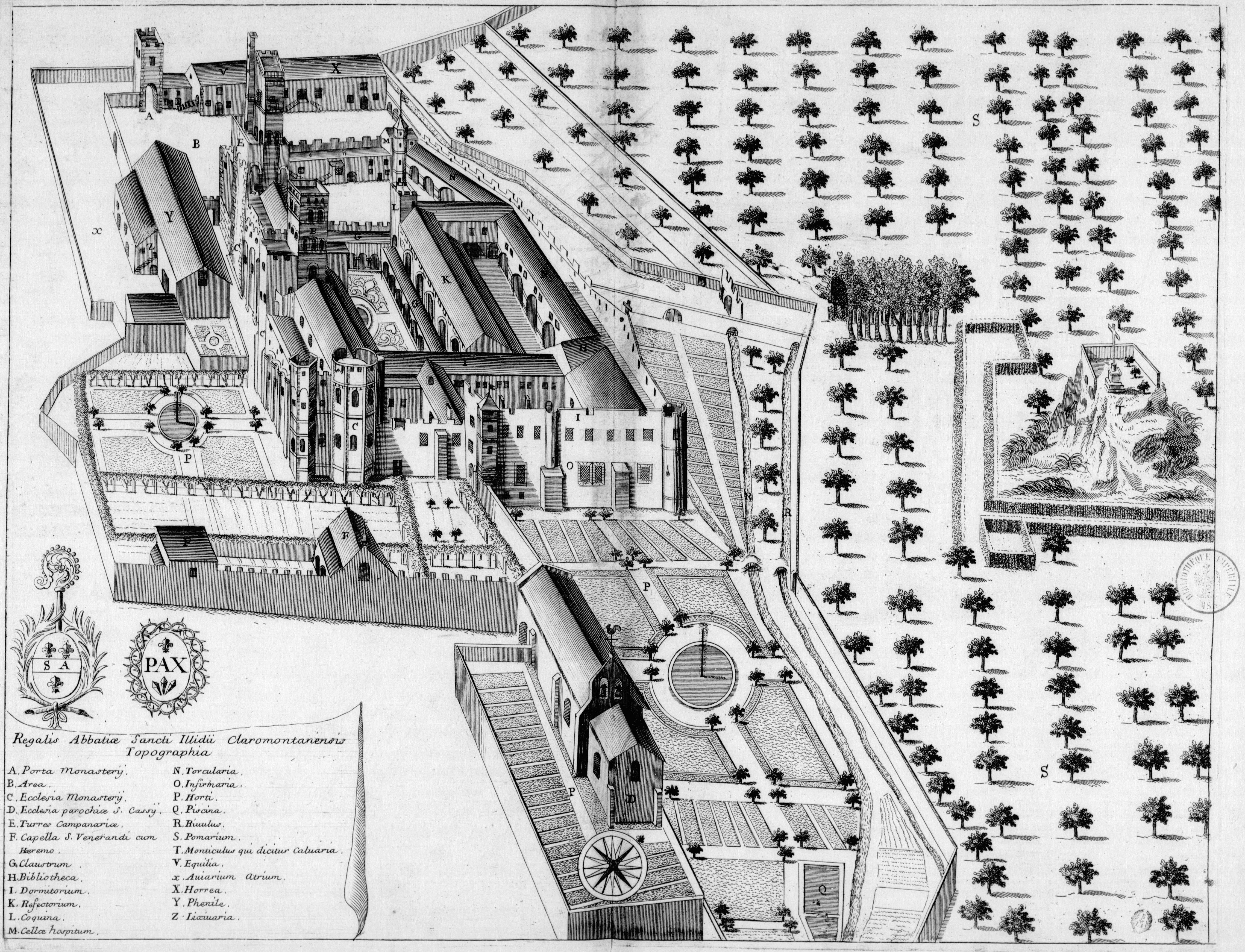 Planche gravée du 17ème siècle représentant l'abbaye de Saint-Alyre, en France, dans le livre Monasticon Gallicanum.